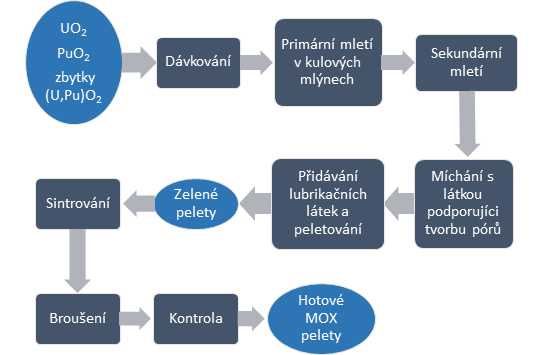 Stručné schéma výroby MOX paliva